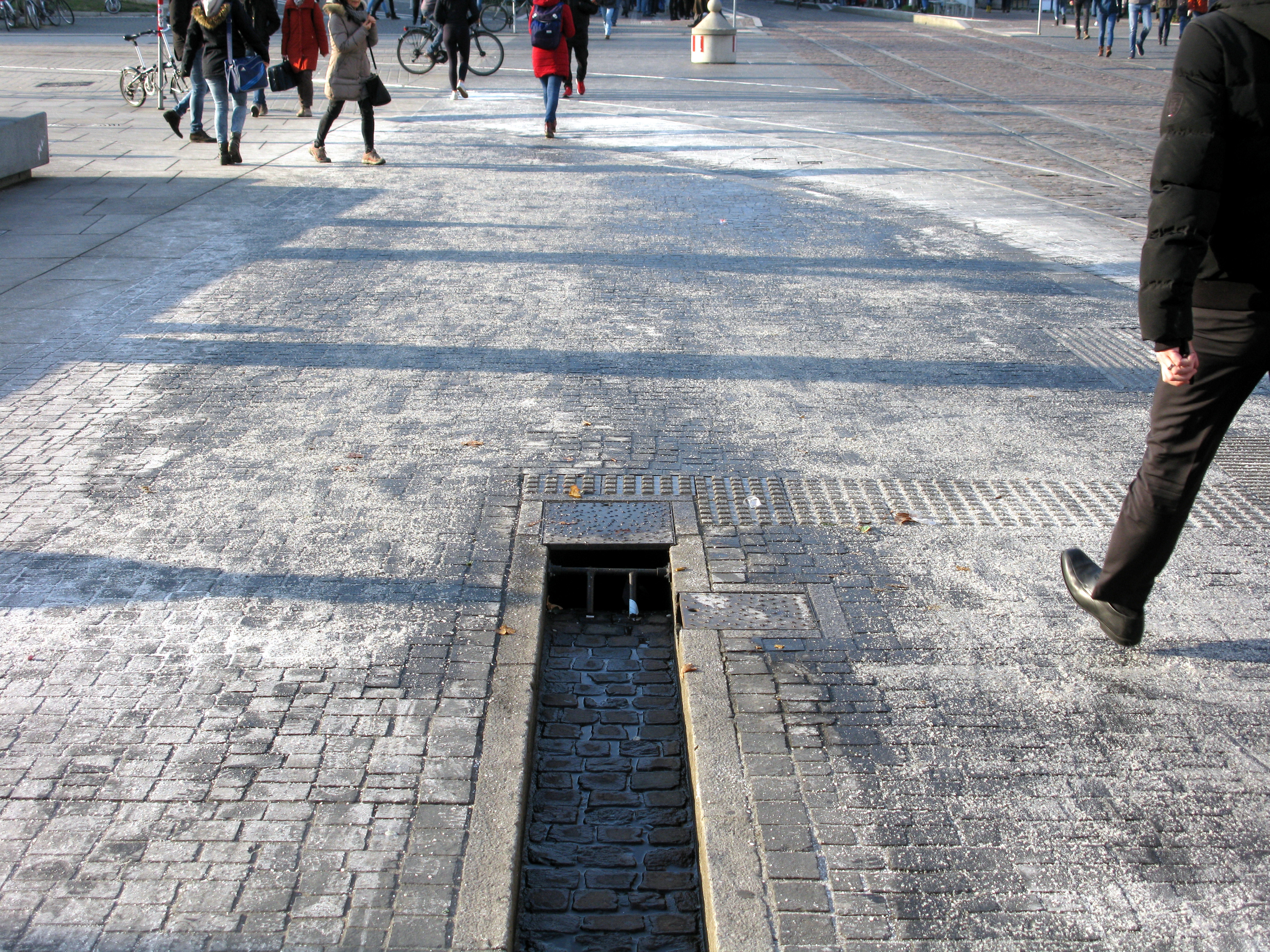 Glatteis durch übergelaufenes Bächle am Freiburger Platz der Alten Synagoge, mit Salz abgestreut